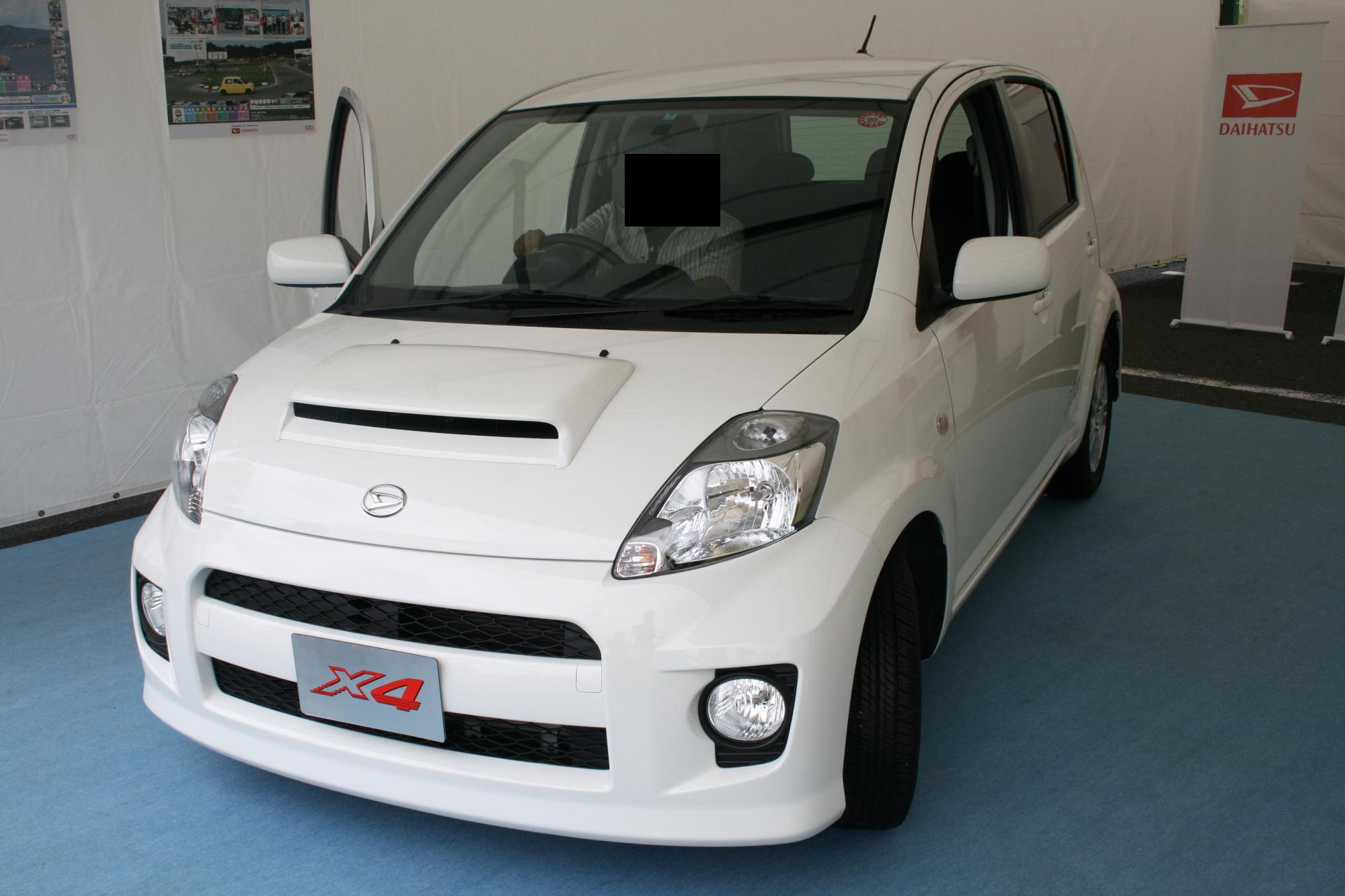 Daihatsu BOON